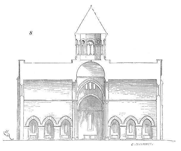 ... La figure 8 donne la coupe sur ef de ce transsept, couronné, sur la croisée, par un clocher. Ainsi, du bas chœur, les religieux pouvaient sonner les cloches; ils officiaient aux chapelles sans sortir de leur clôture, et la nef n'était que le lieu de réunion des fidèles, complétement indépendant des parties réservées au culte. Les églises cisterciennes présentent des dispositions analogues, permettant aux fidèles d'assister aux cérémonies sans pénétrer dans les clôtures ...